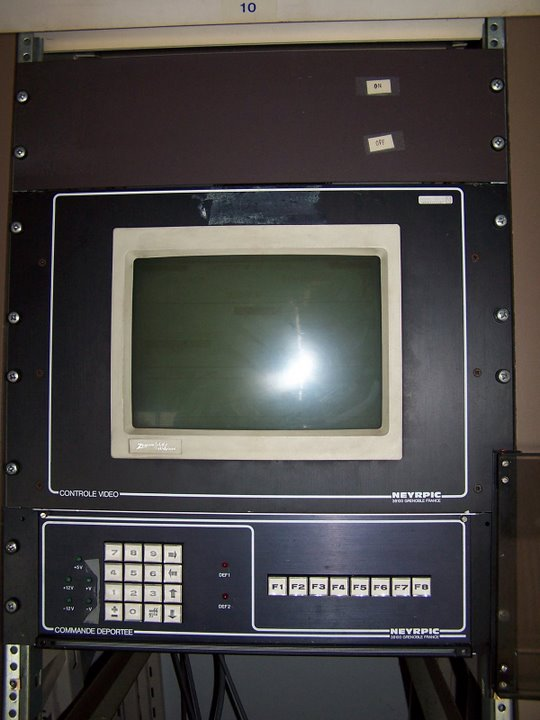 Systeme de poursuite satellite NEYRPIC / Batiment 1 / Pleumeur-Bodou / France